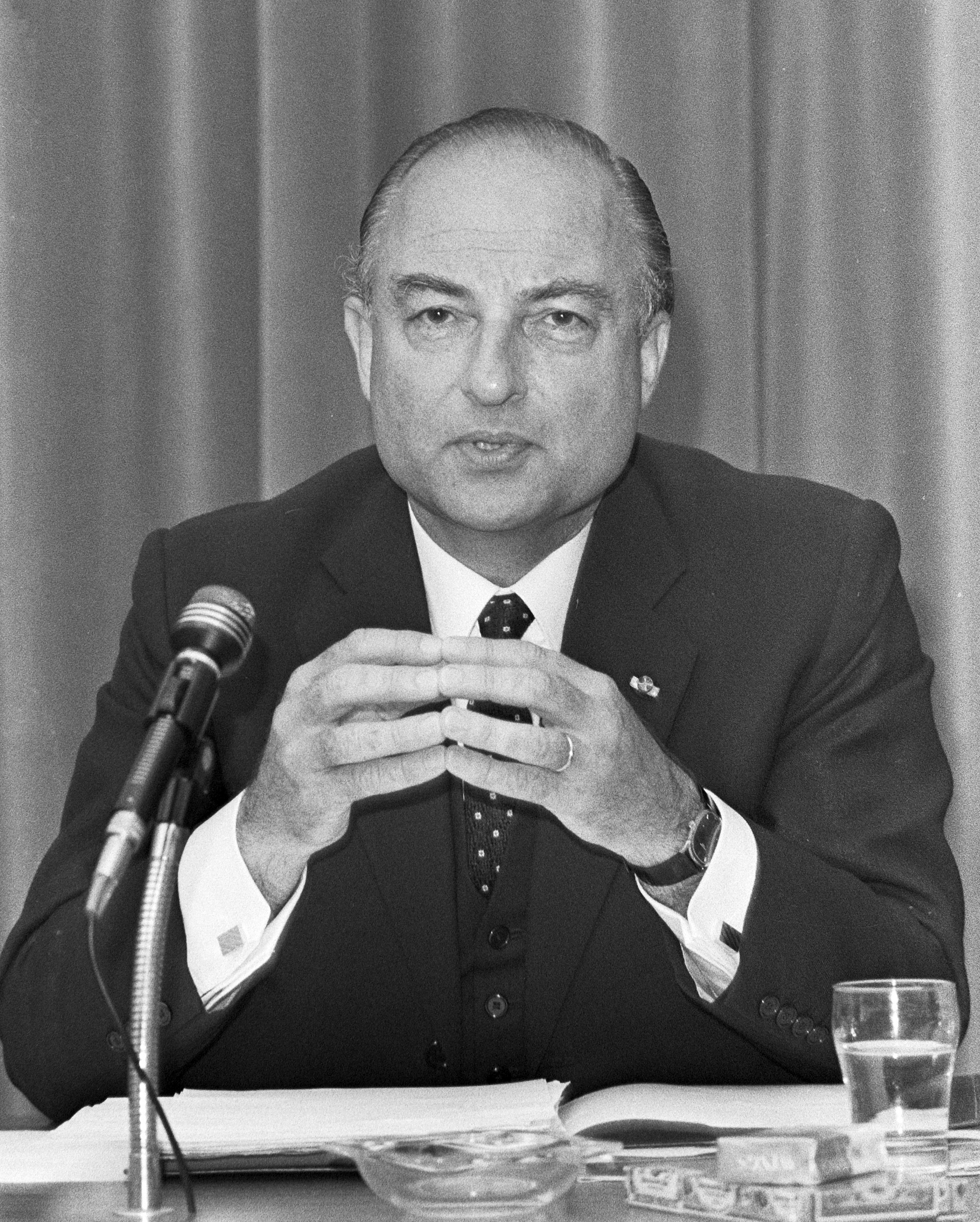 Persconferentie minister Schmelzer van Buitenlandse Zaken op Minister van Buitenlandse Zaken , Den Haag , Schmelzer aan het woord, kop /